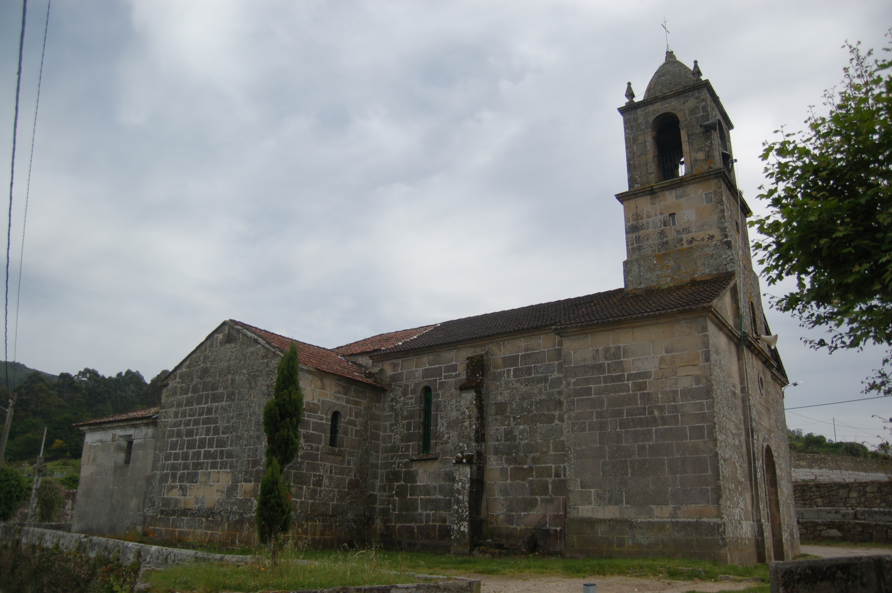 Igrexa parroquial de Santa María de Ardán (Marín)